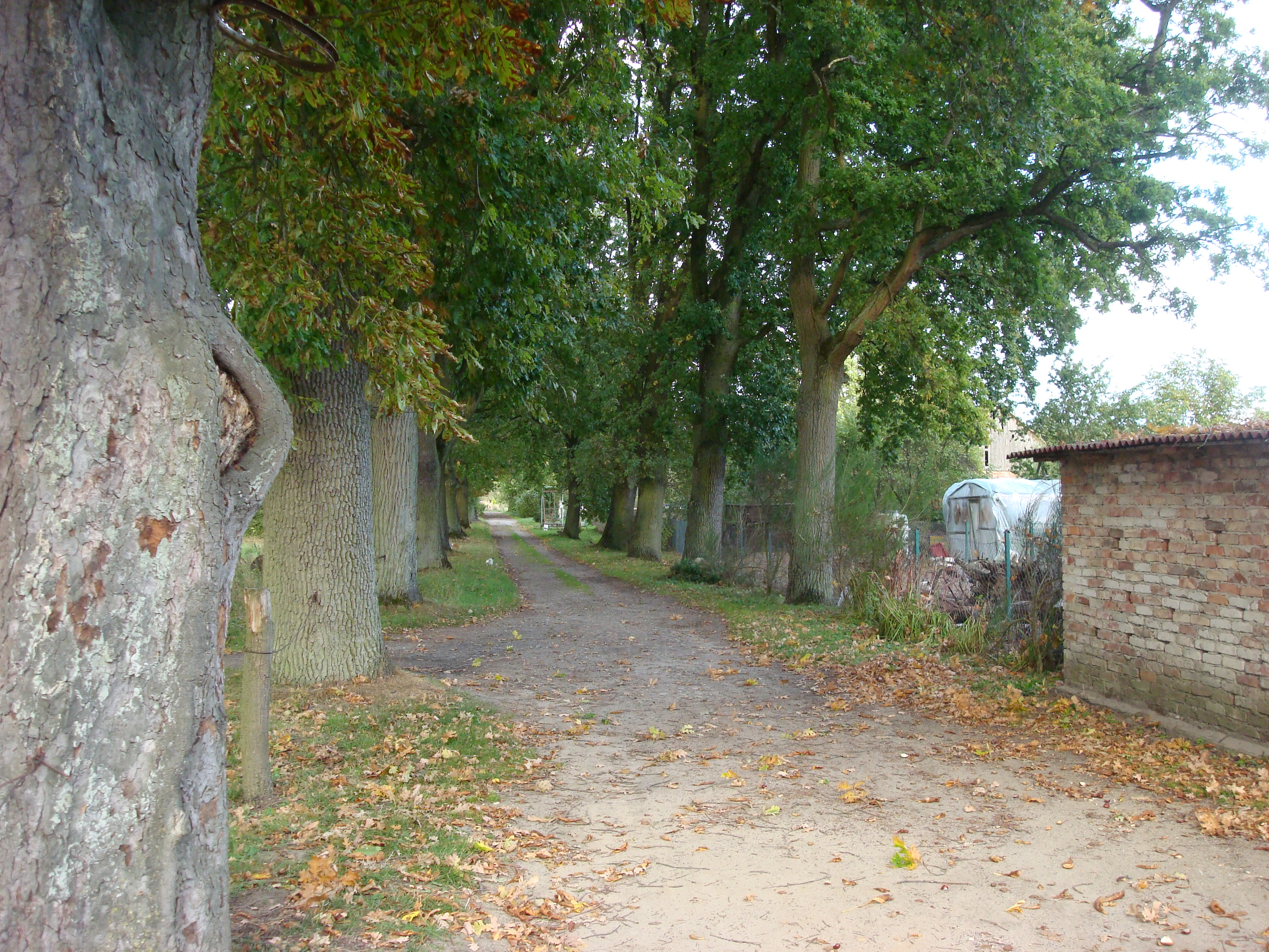 Borzysław, park dworski, 2 poł. XIX